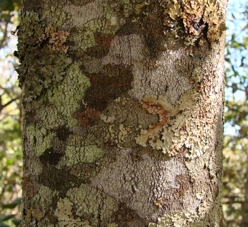 Ocotea spixiana - LAURACEAE Jardim Botânico de Brasília - Distrito Federal - Brasil.